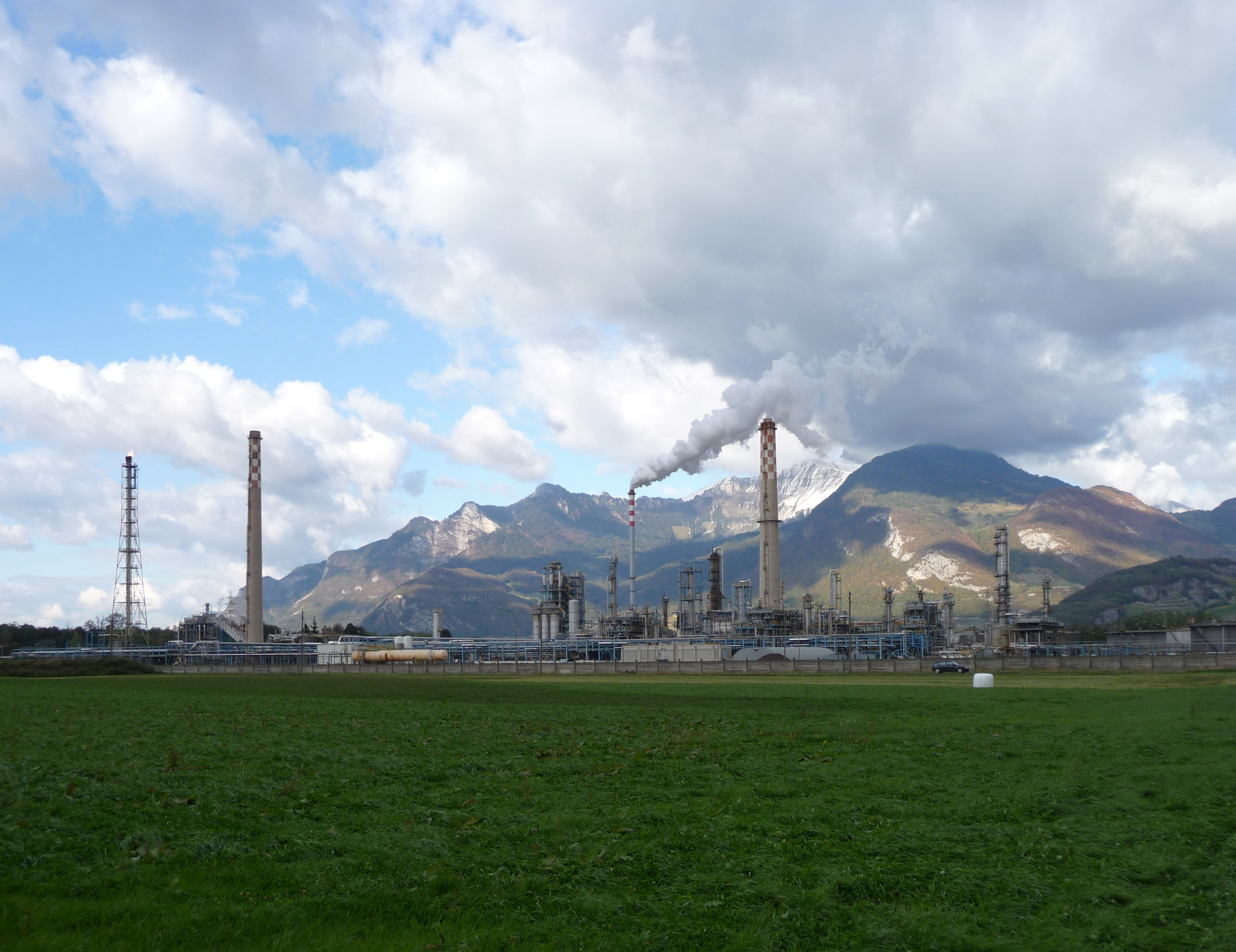 Raffinerie Collombey